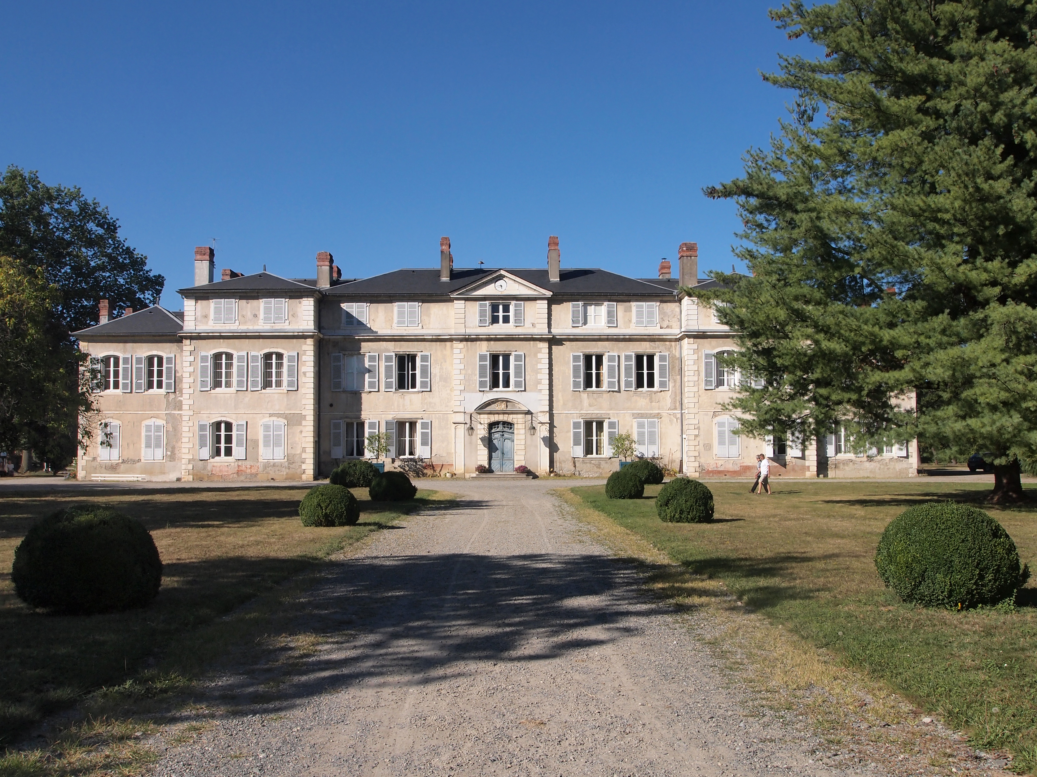 Haras national de Gelosharas, escalier, élévation, (Inscrit, 2011)